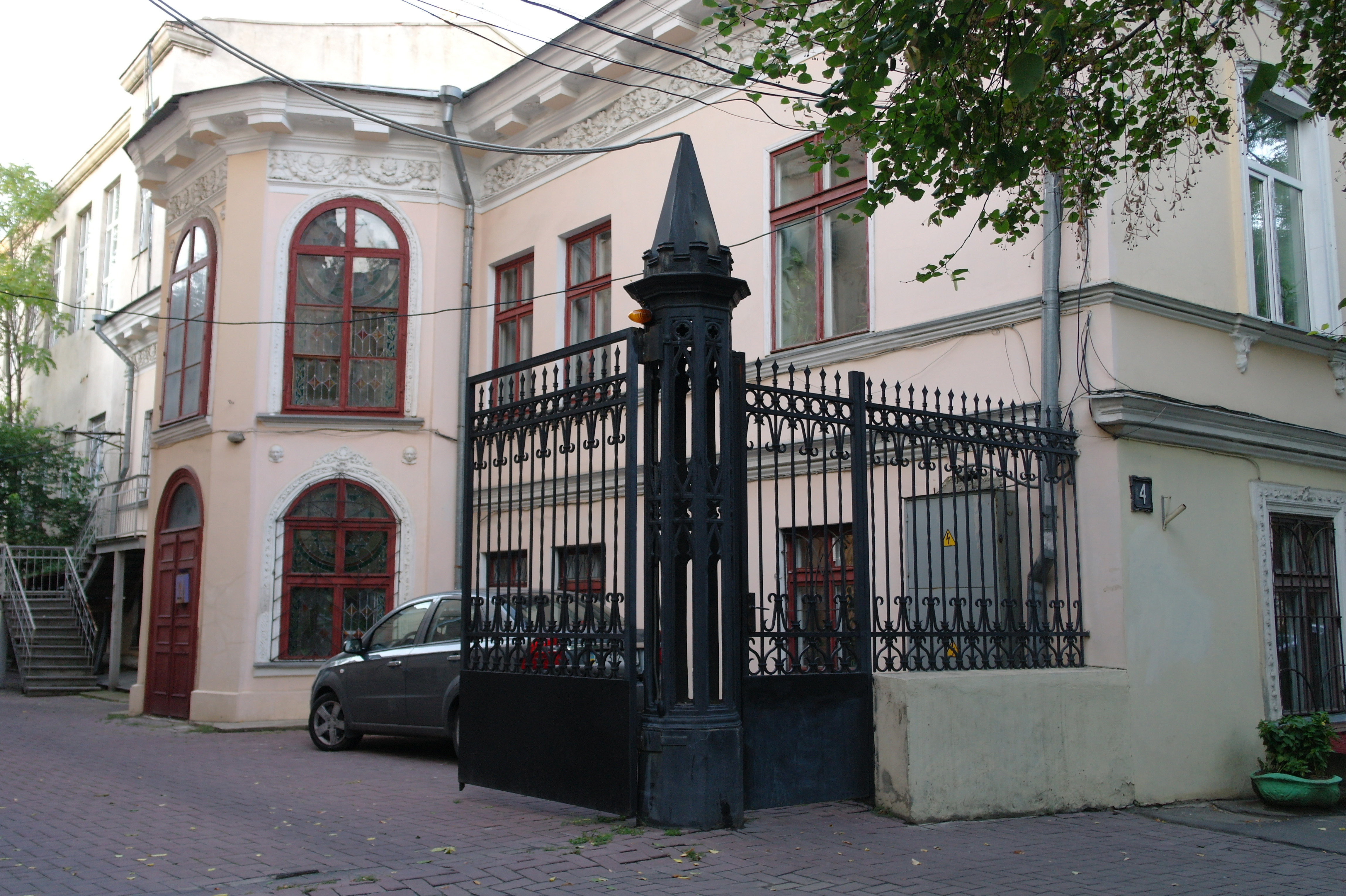 Одеса, Гоголя, 18